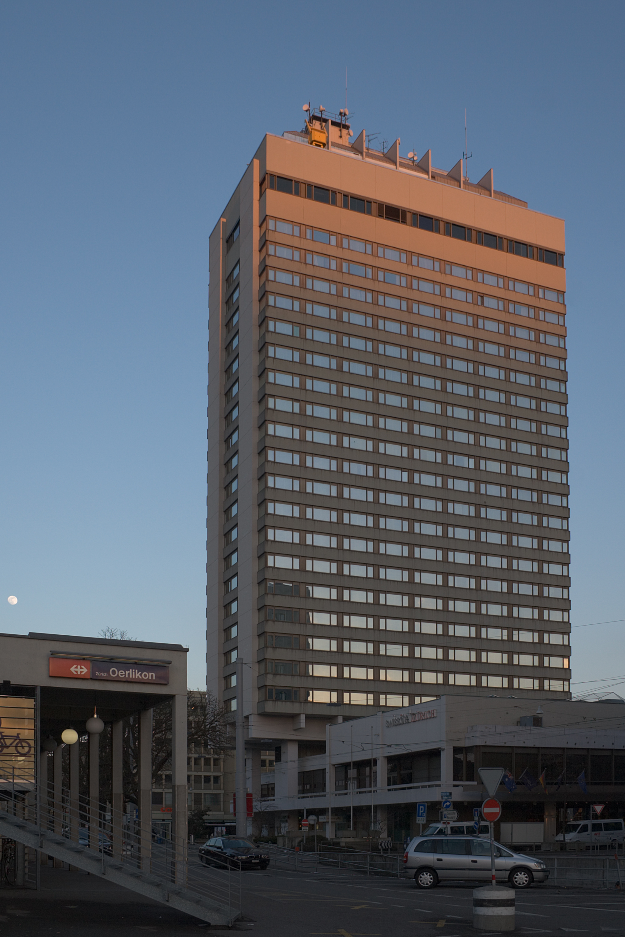 Hochhaus Swissôtel im Zürcher Stadtteil Oerlikon, Schweiz Eröffnet 1972 als Hotel International